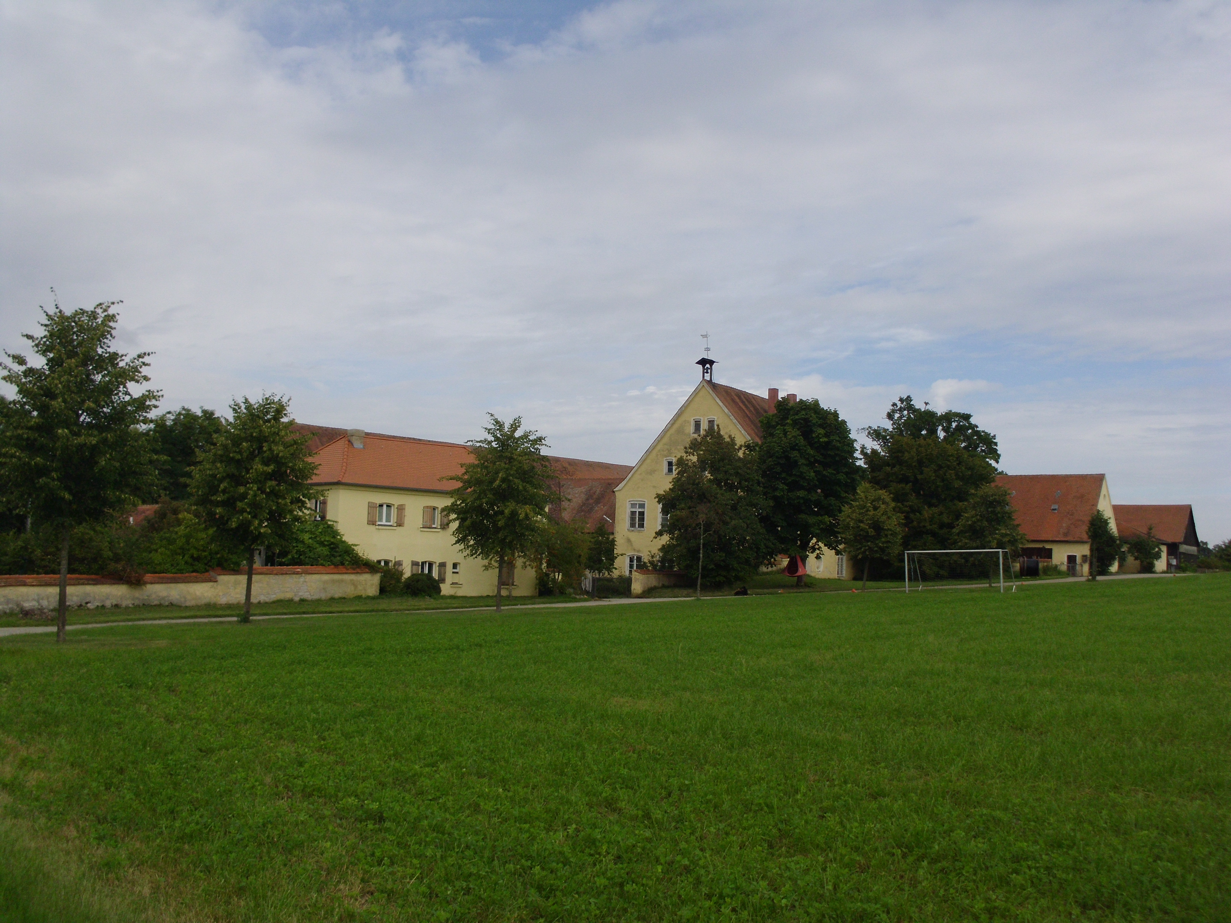 Bergnershof, Ortssteil von Treuchtlingen im mittelfränkischen Landkreis Weißenburg-Gunzenhausen